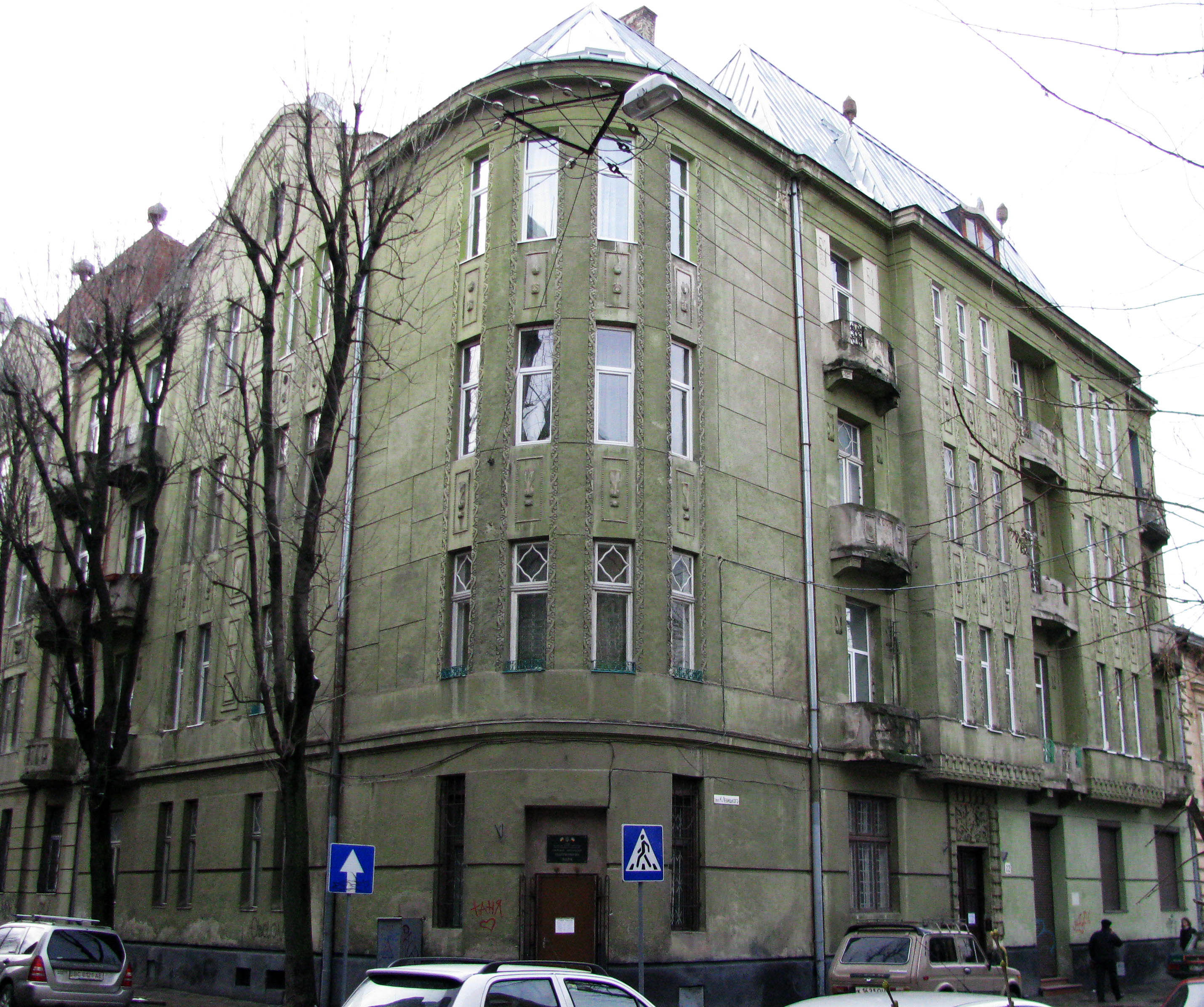 1=Житловий будинок на вулиці Конопницької, 2 у Львові. Архітектор Юзеф Авін (1883 — 1942 (1943)).